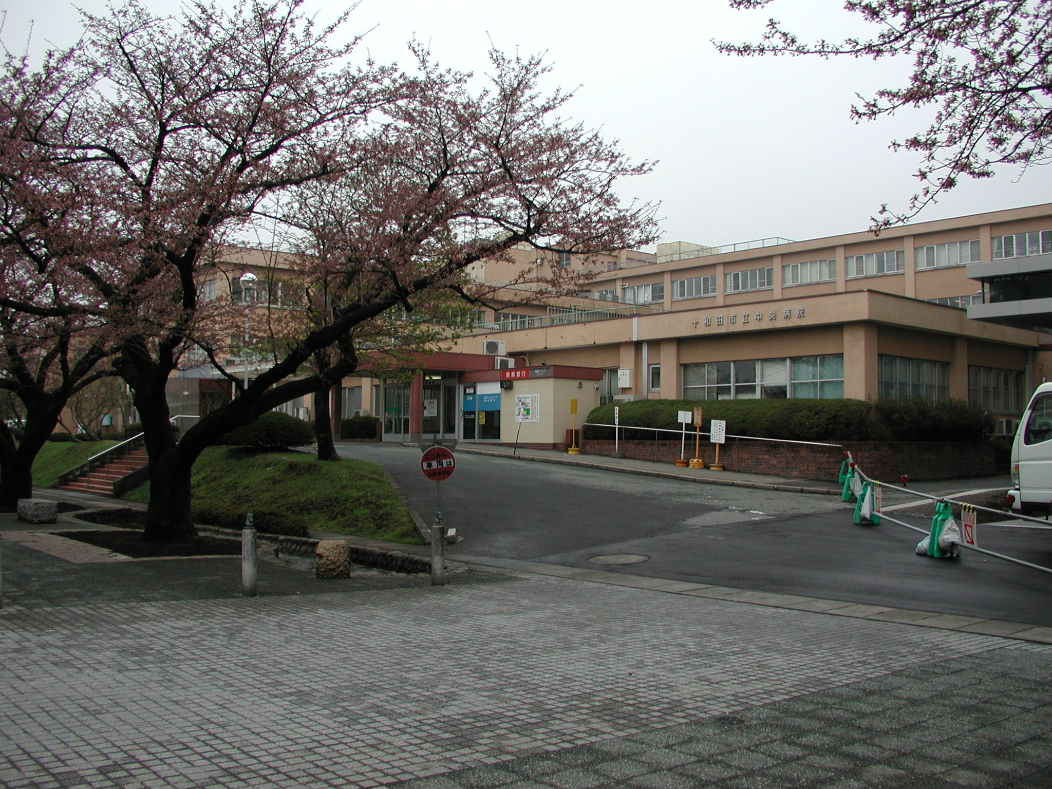 十和田市立中央病院 東棟：正面玄関 ※：東側に建てられた新本館の開院に伴い、この秋までに解体され、後に駐車場として整備されることとなっている。